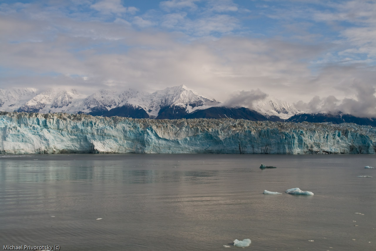 Ледник Хаббард (Hubbard Glacier)